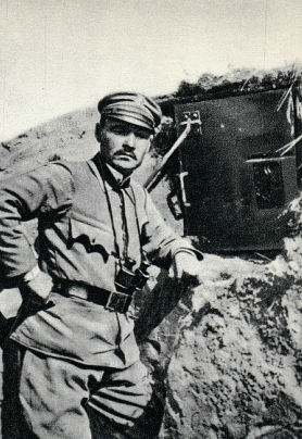 Por. Bolesław Popowicz w okopach 6 pułku piechoty Legionów Polskich pod Sitowiczami.